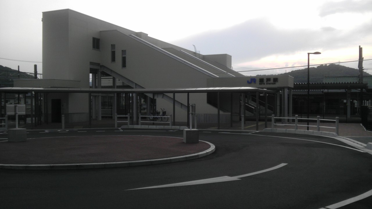 瀬戸駅南口